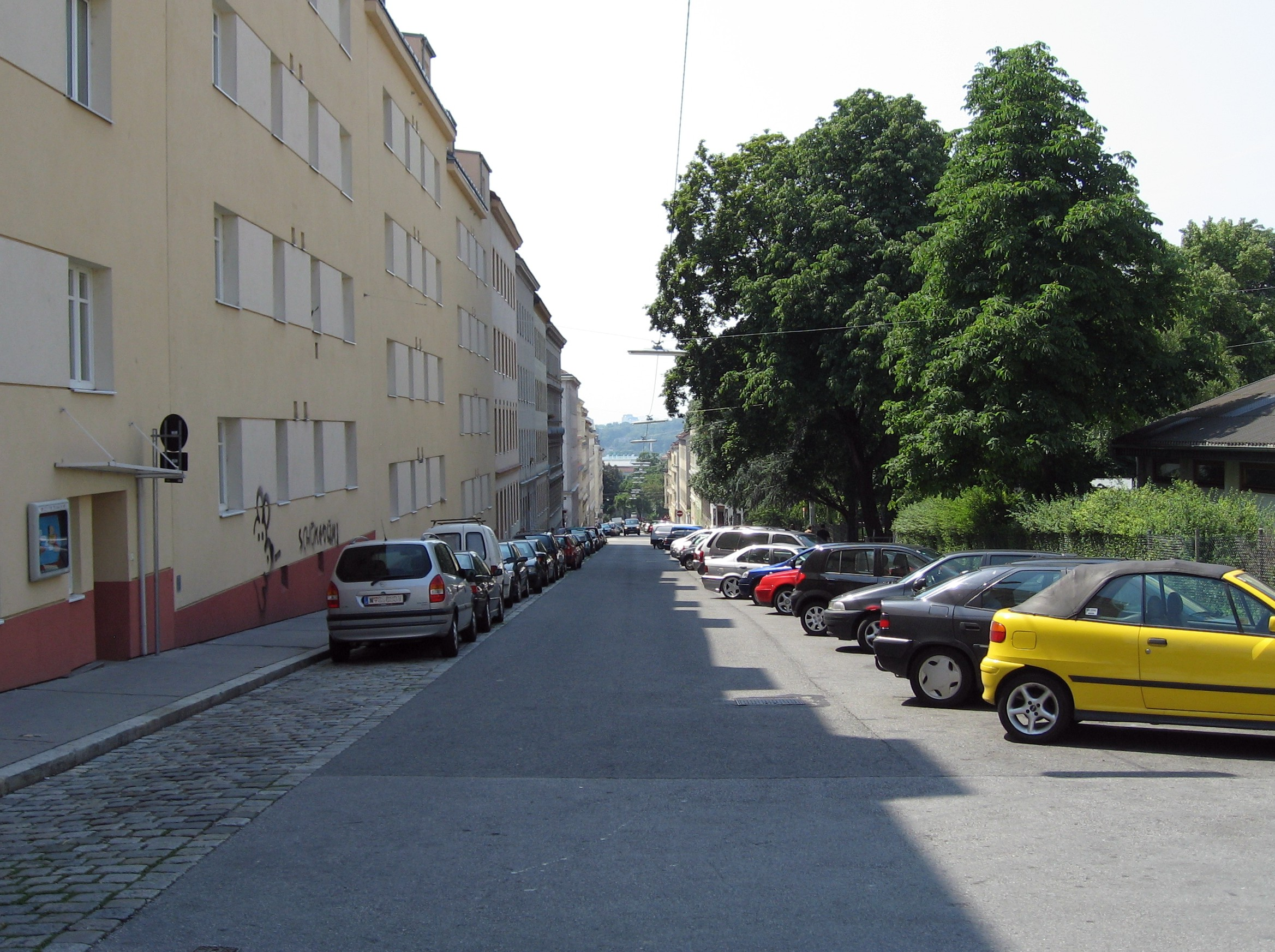 Eduard-Sueß-Gasse in Wien